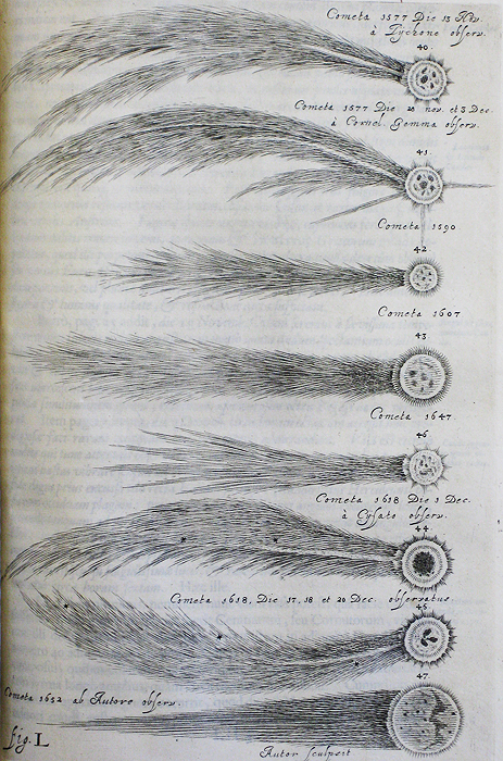 Tavola L dell'opera Cometographia di Johannes Hevelius